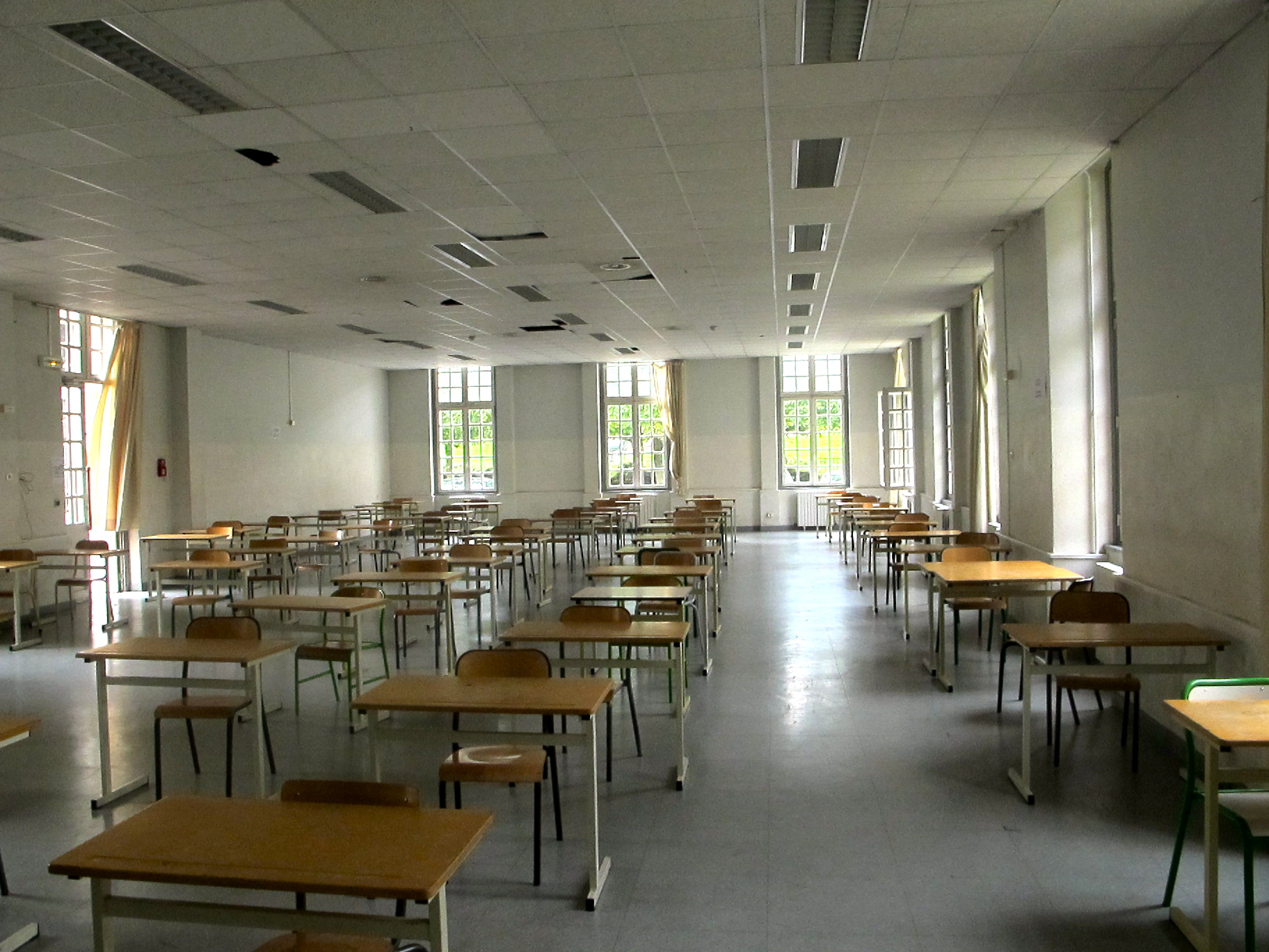 Salle d'examen du lycée militaire de Saint-Cyr.